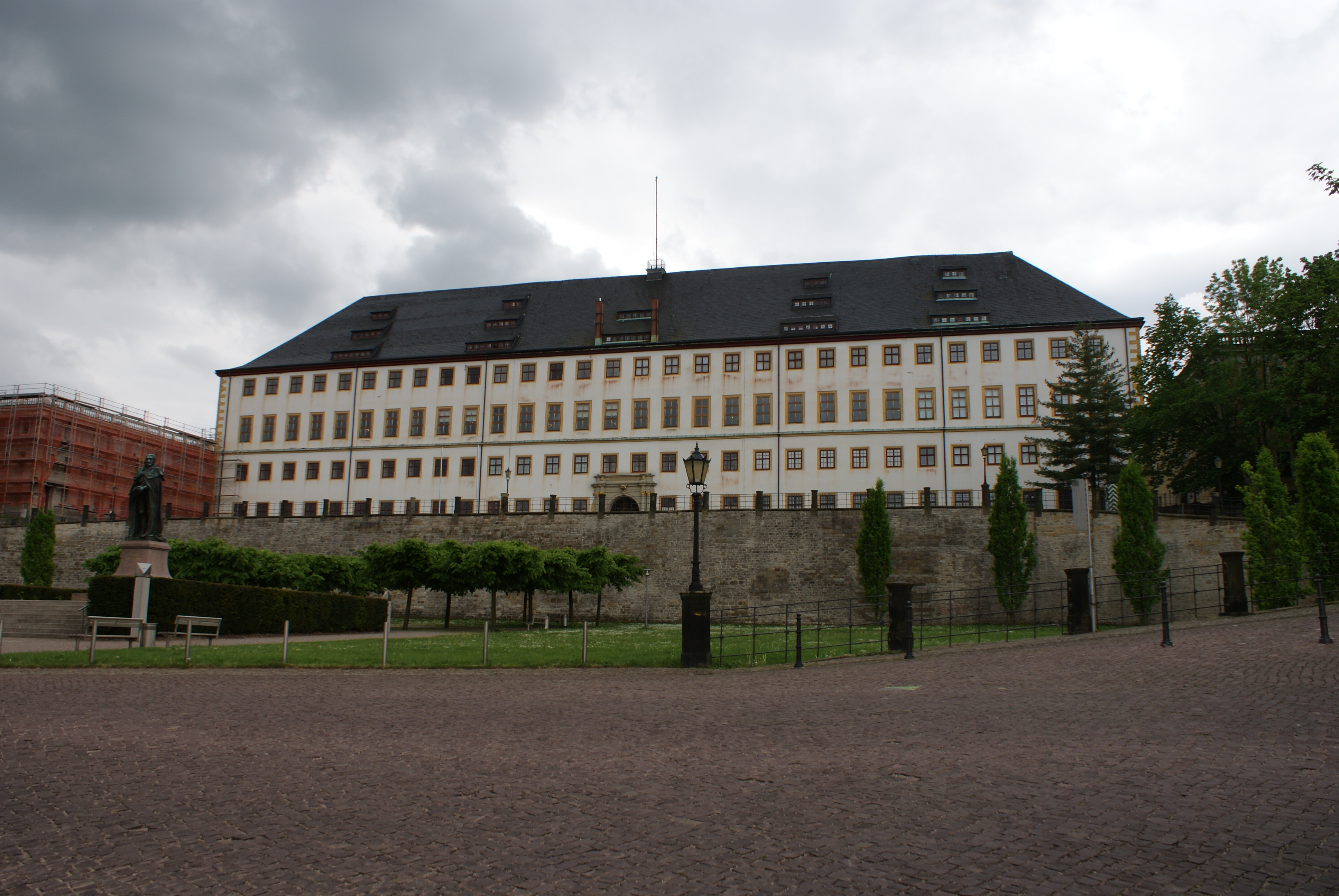 Schloss Friedenstein in Gotha (Hauptflügel); Ansicht von Norden